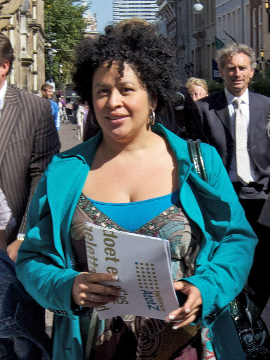 Tania Kross bij de lancering van de website U Aan Zet